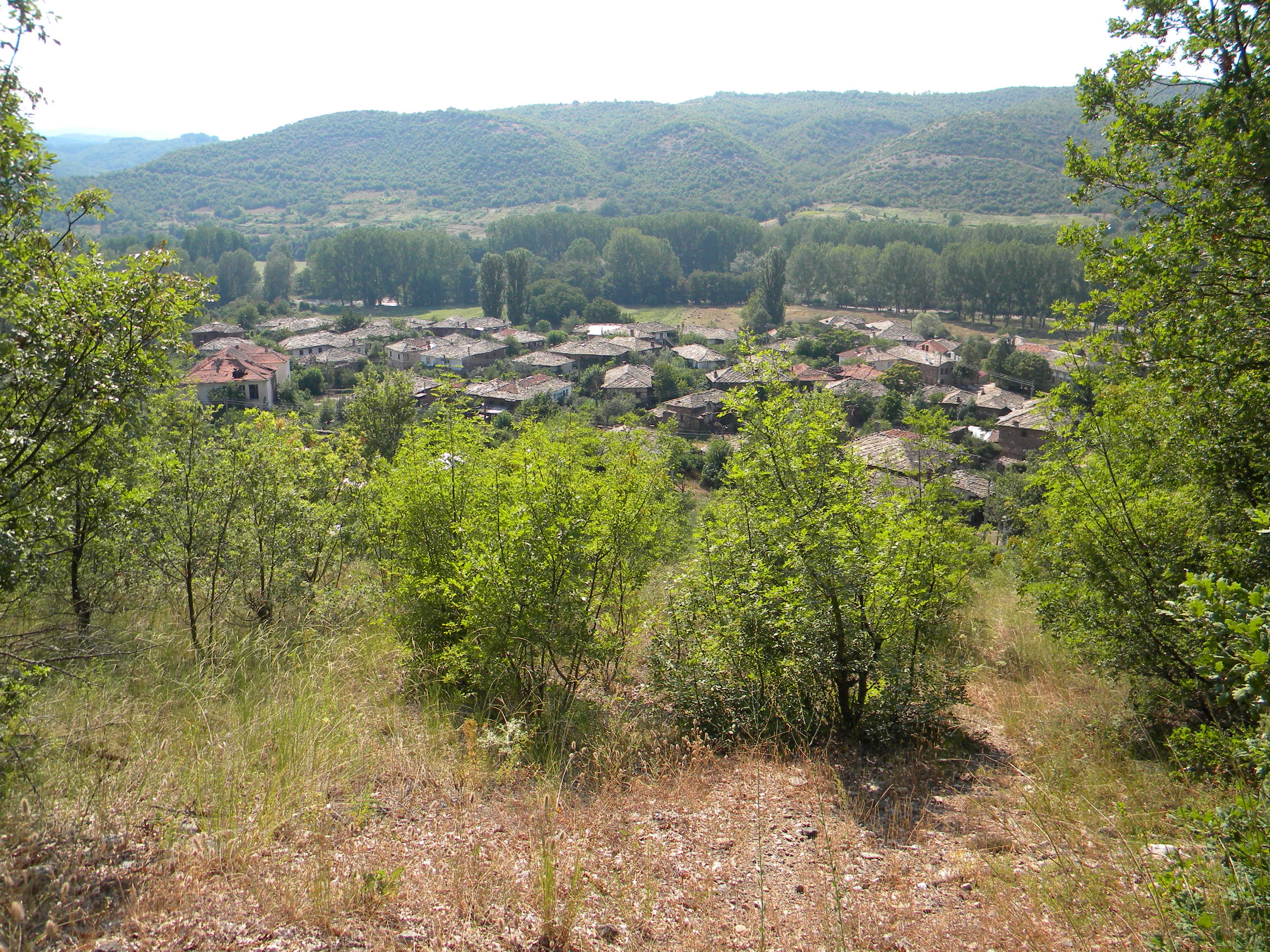 Изглед от село Долно Луково